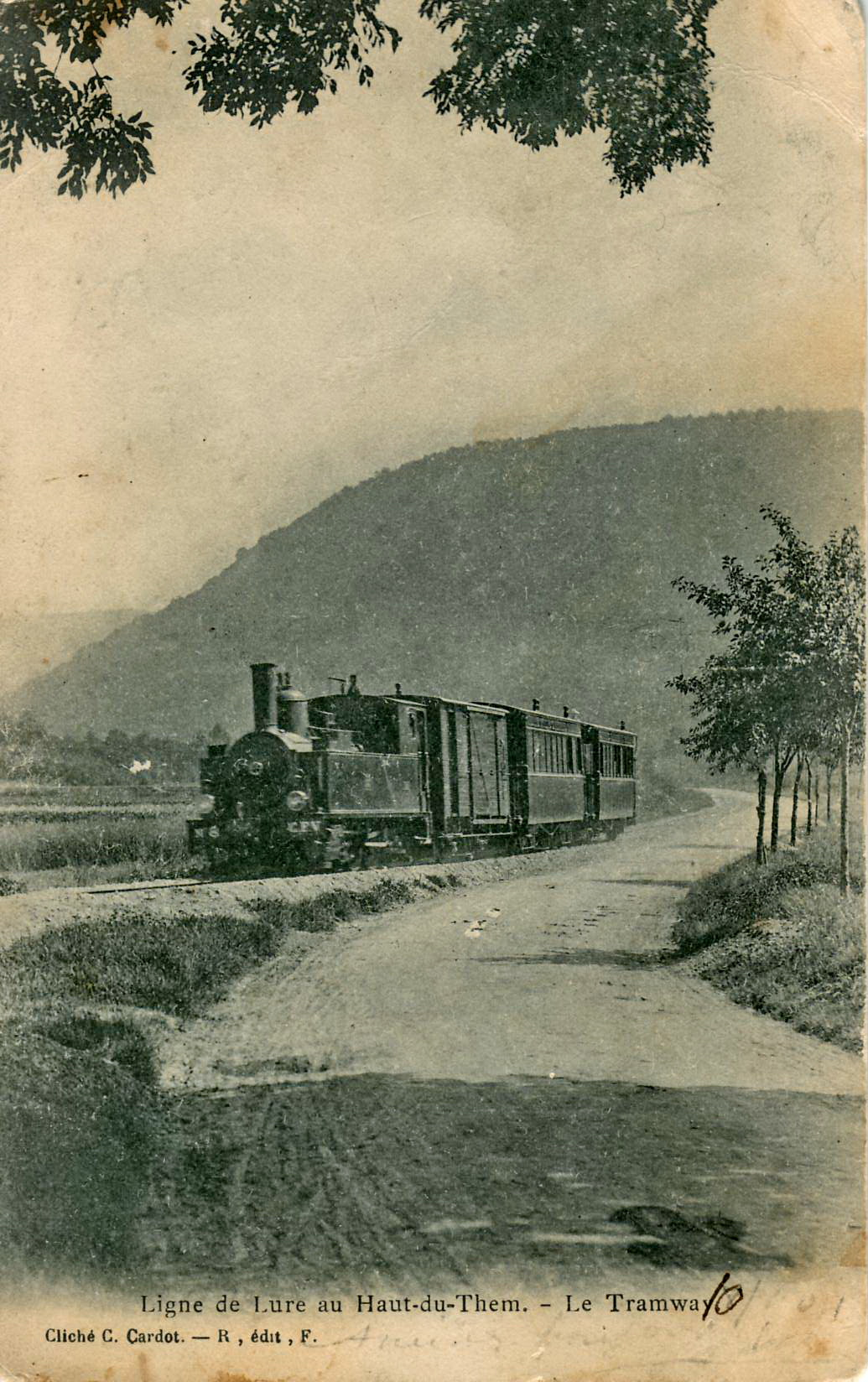 Carte postale ancienne cliché C. Cardot. R, édit, F. : Ligne de Lure au Haut-du-Them - Le Tramway